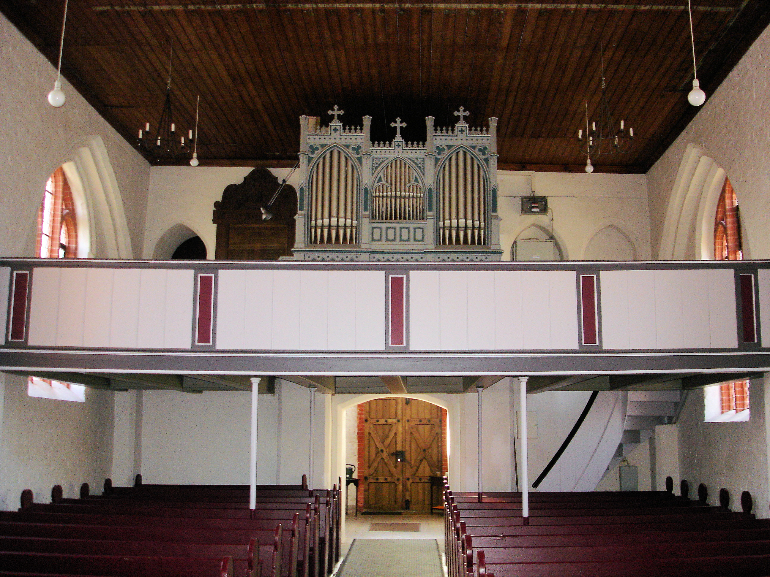 Kirche Rövershagen, Orgel / Church in Rövershagen, organ